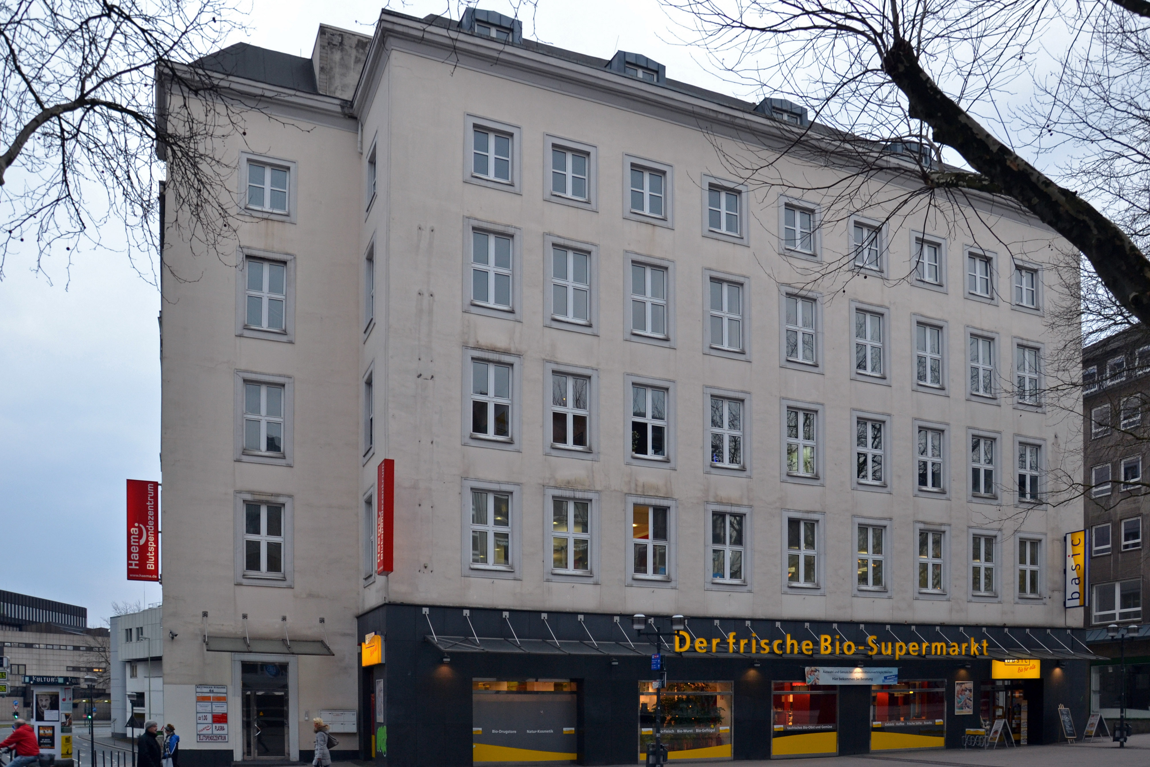 Geschäftgebäude am Flachsmarkt im Essener Stadtkern, am Standort des ehemaligen Keramikhauses aus dem Jahr 1912; 1934 wurde die ursprüngliche Fassade von 1912 mit Delfter Keramik, wegen Umbau zum Gauwirtschaftsgebäude, größtenteils entfernt; im Zweiten Weltkrieg wurde das Haus nahezu zerstört, in den Nachkriegsbau zog Westmöbel bis 1993 ein; 1994 wurden beim Umbau zum Bürohaus Reliefreste entdeckt, die sich heute unter Putz befinden und unter Denkmalschutz stehen